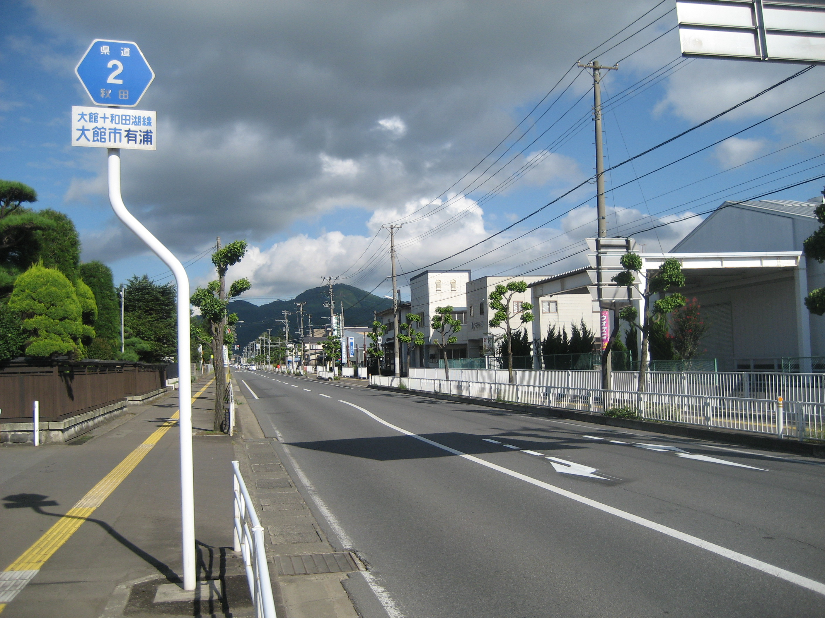 秋田県道2号線大館市有浦付近